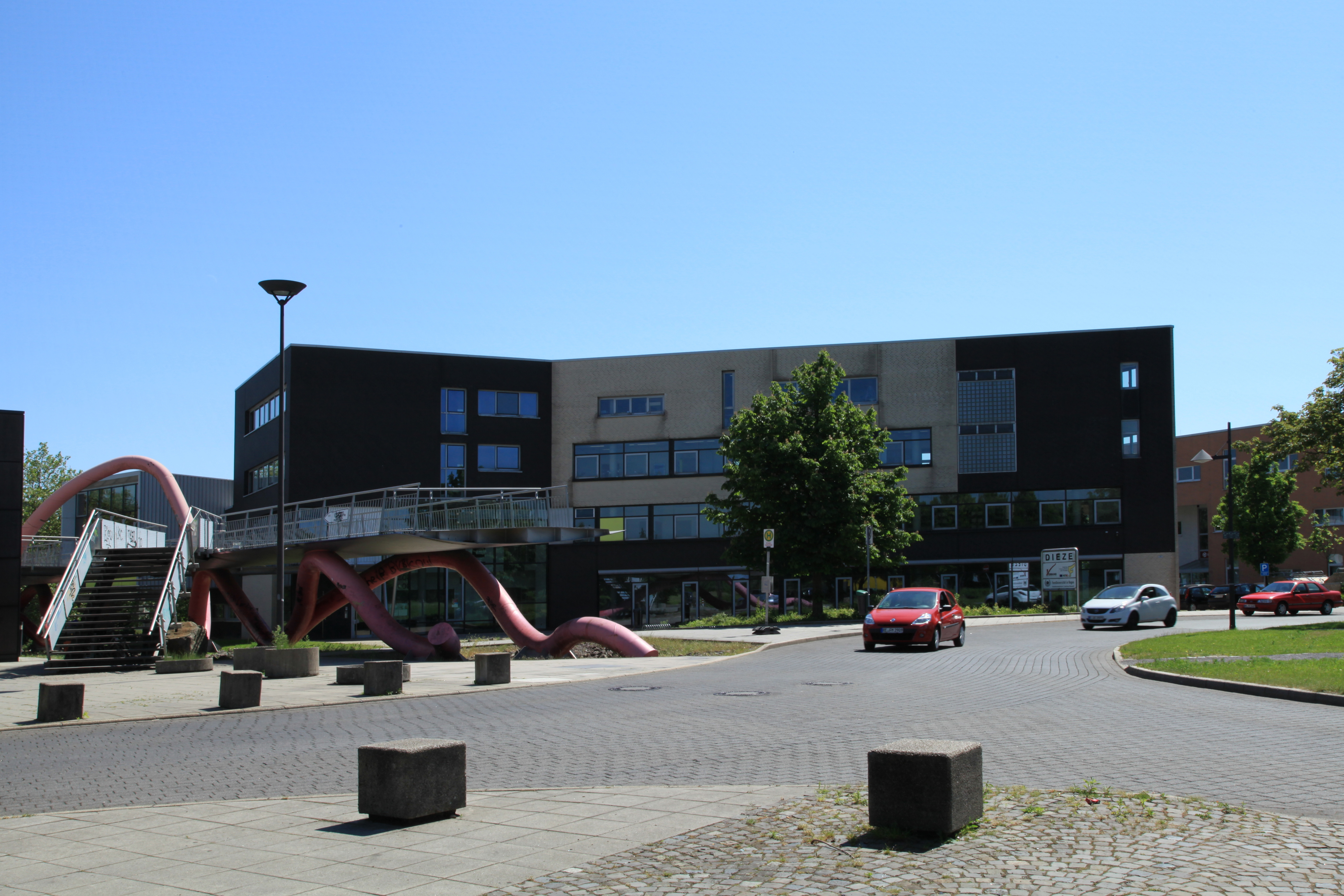 Campus der 'FernUniversität in Hagen', Erinstraße 6 und Krickesteg in Castrop-Rauxel